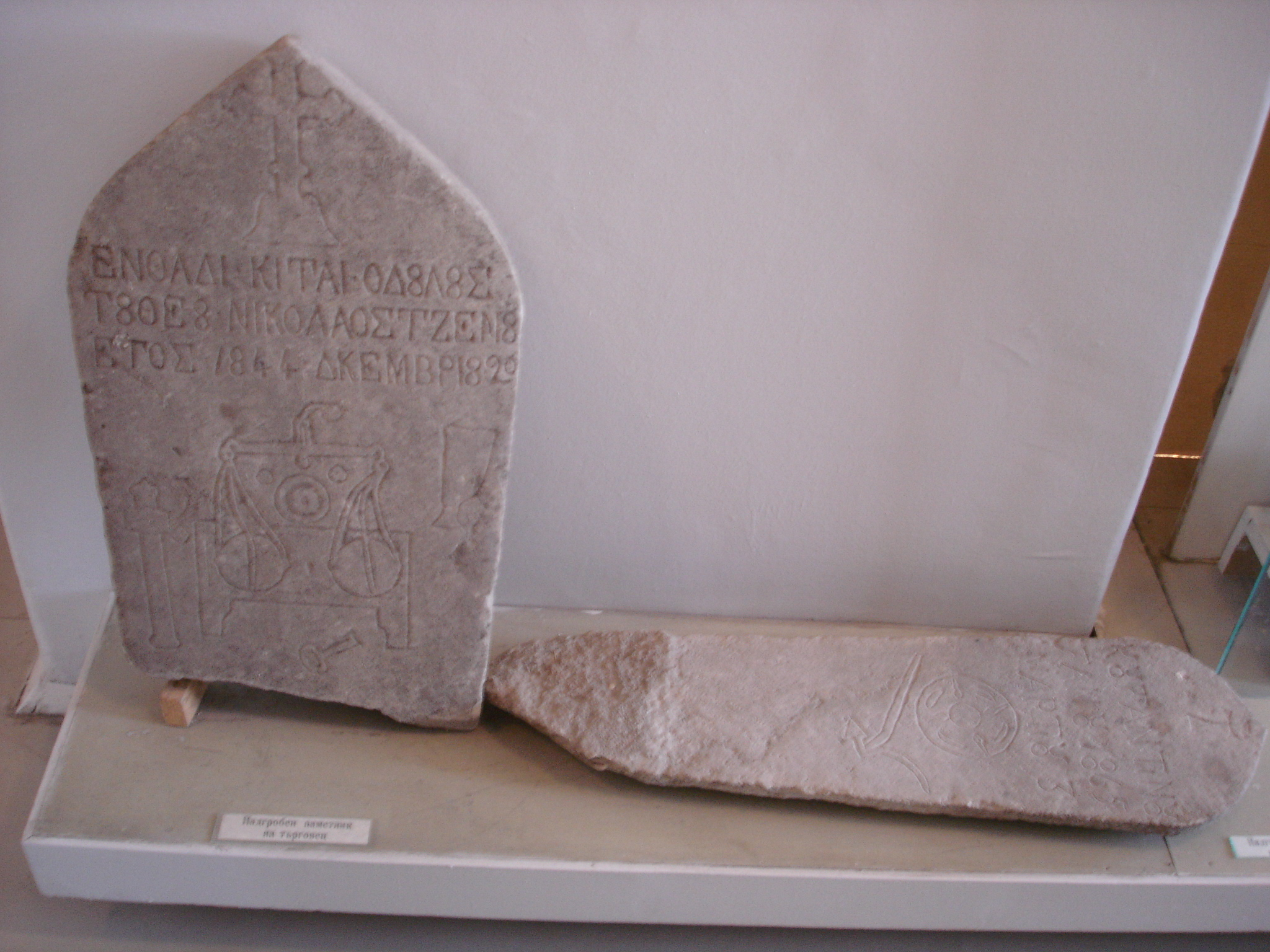 Museum Exposition in Elhovo, Bulgaria